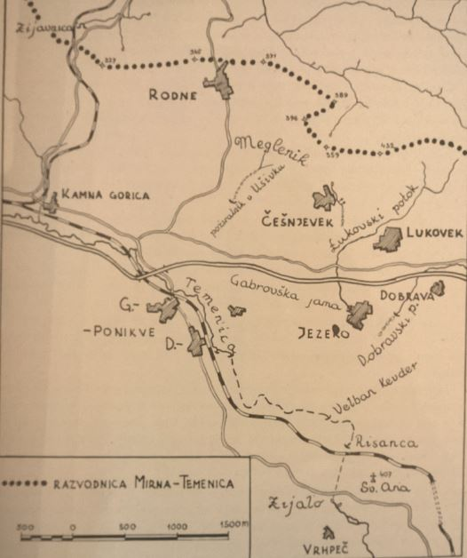 Preprost načrt ponikalnic